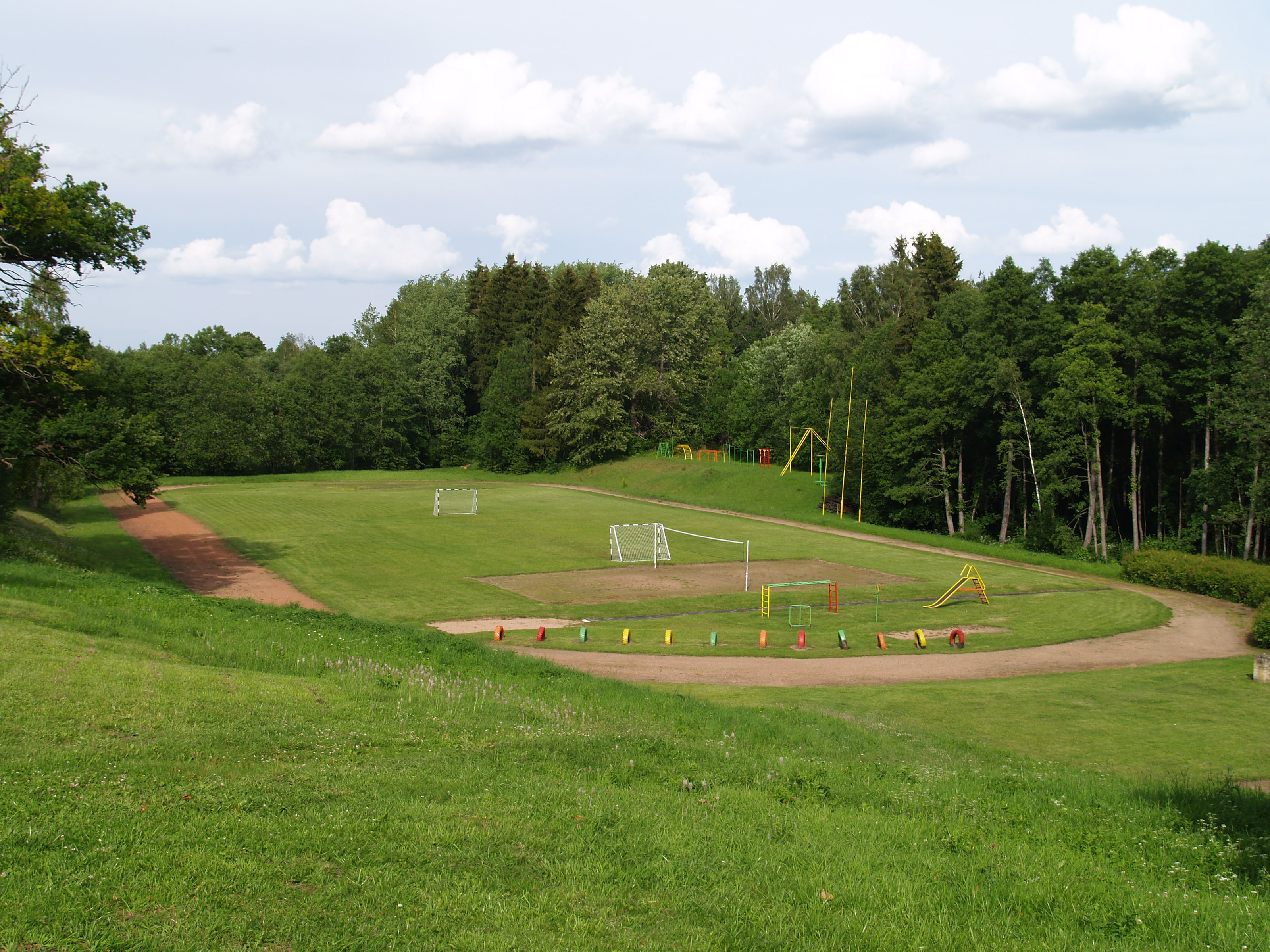 Suislepa staadion